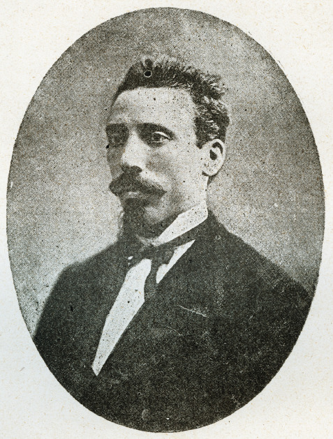 Foto di Luciano Banchi